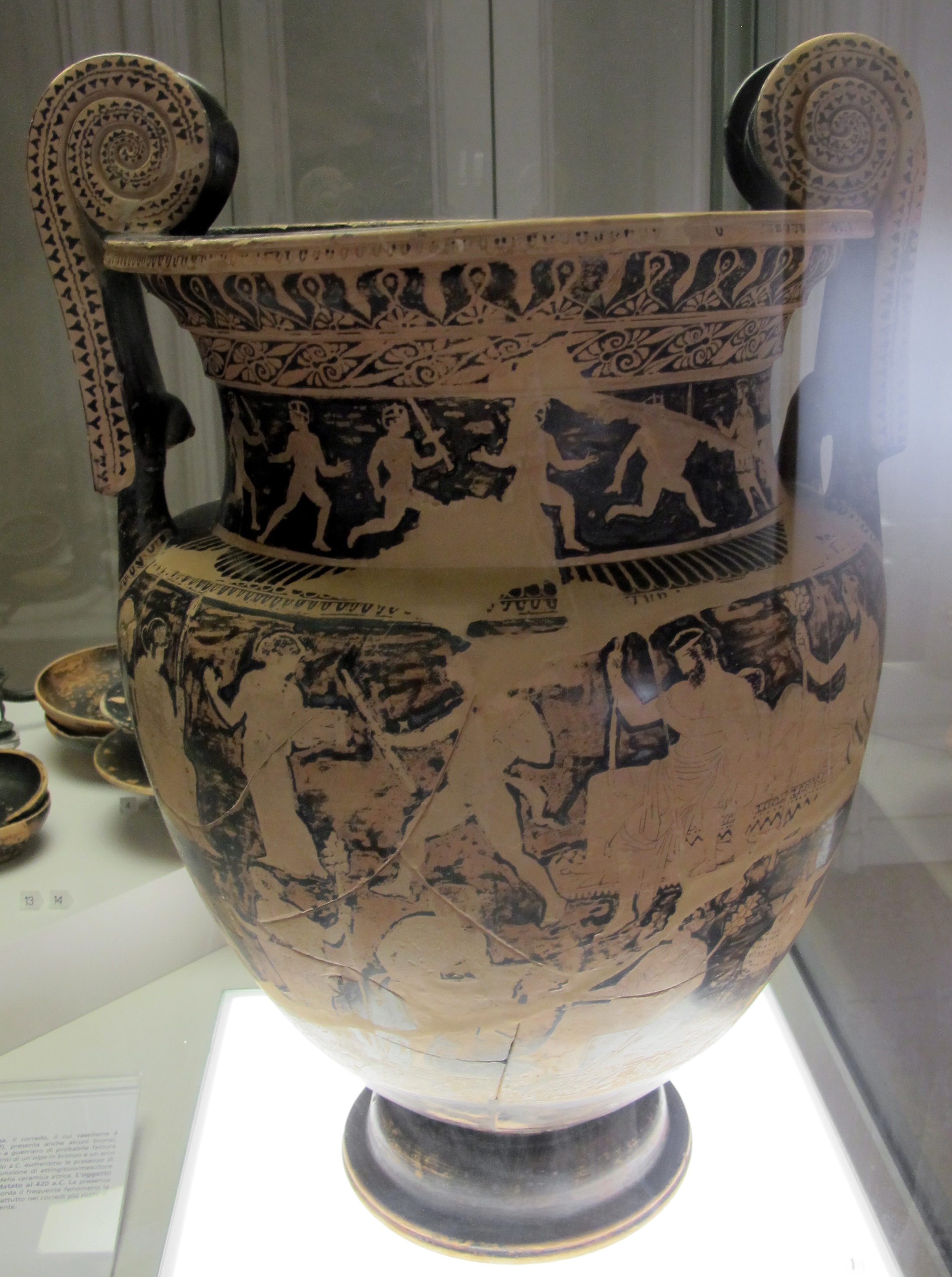 Museo Archeologico Nazionale - MIBAC This is a photo of a monument which is part of cultural heritage of Italy.